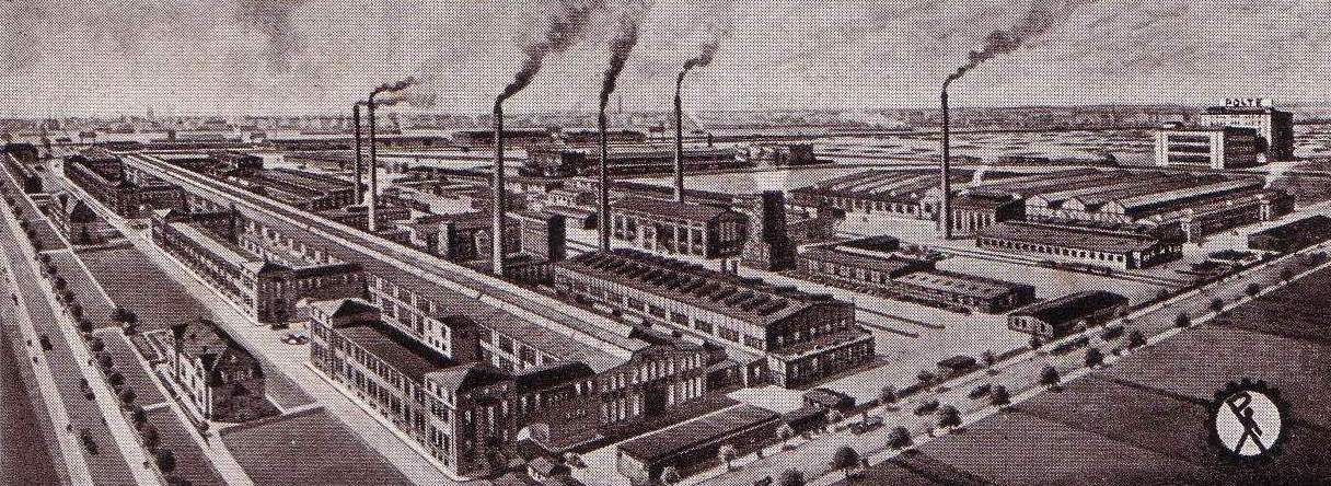 Hauptfabrik der Polte-Werke in der Poltestr in Magdeburg etwa zur Jahrhundertwende